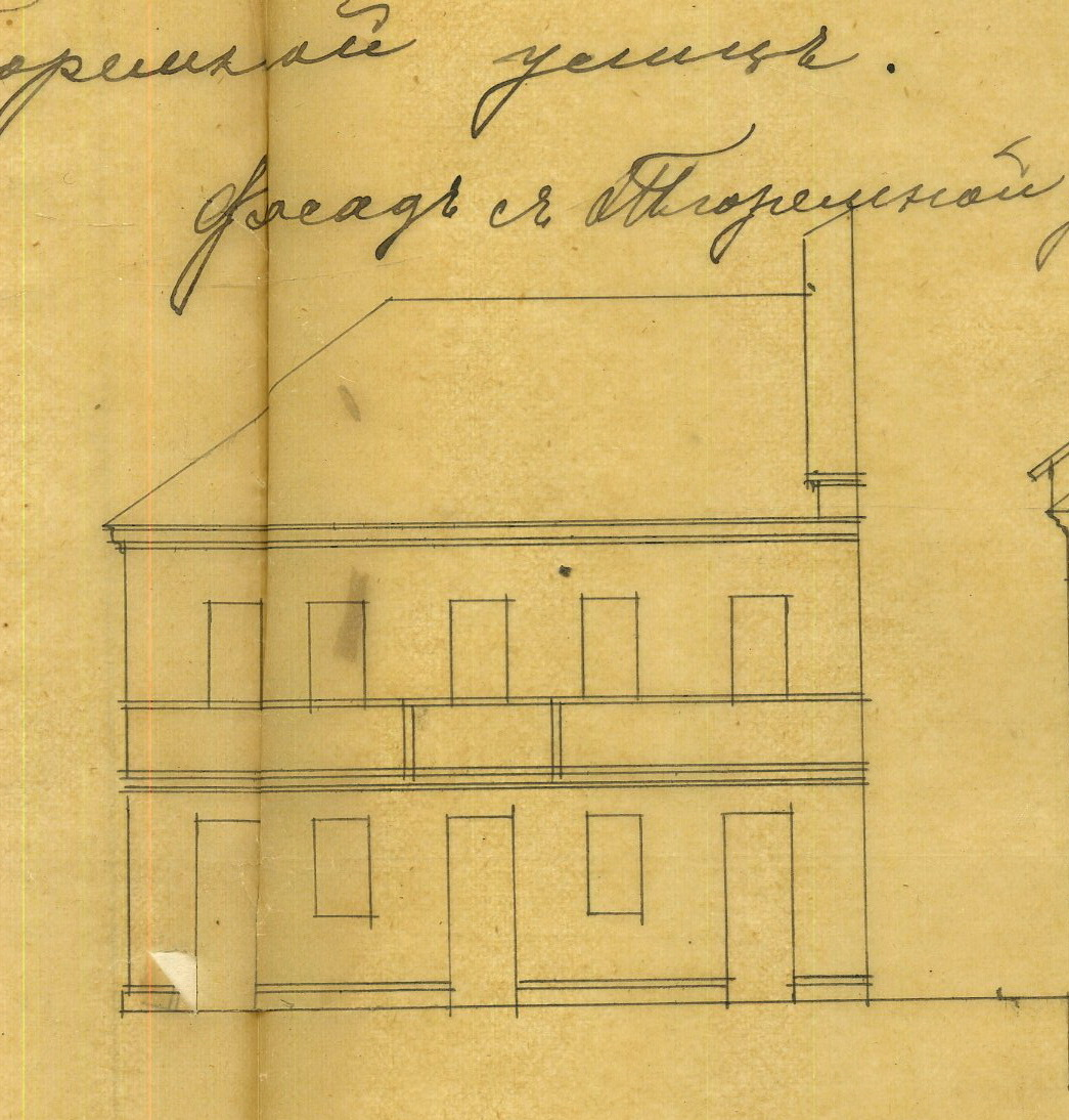 Беларуская (тарашкевіца): Менск (Miensk), рог вуліц Зборавай (vulica Zboravaja) і Фэліцыянаўскай (vulica Felicyjanaŭskaja). Дом Бамдаса (Bamdas)